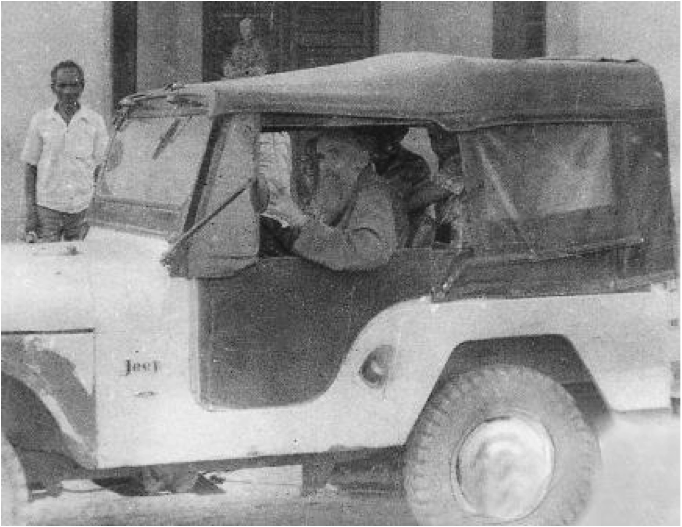 Frei Alberto no jipe que utilizava para alcançar os lugares distantes onde curava os doentes e administrava os sacramentos.